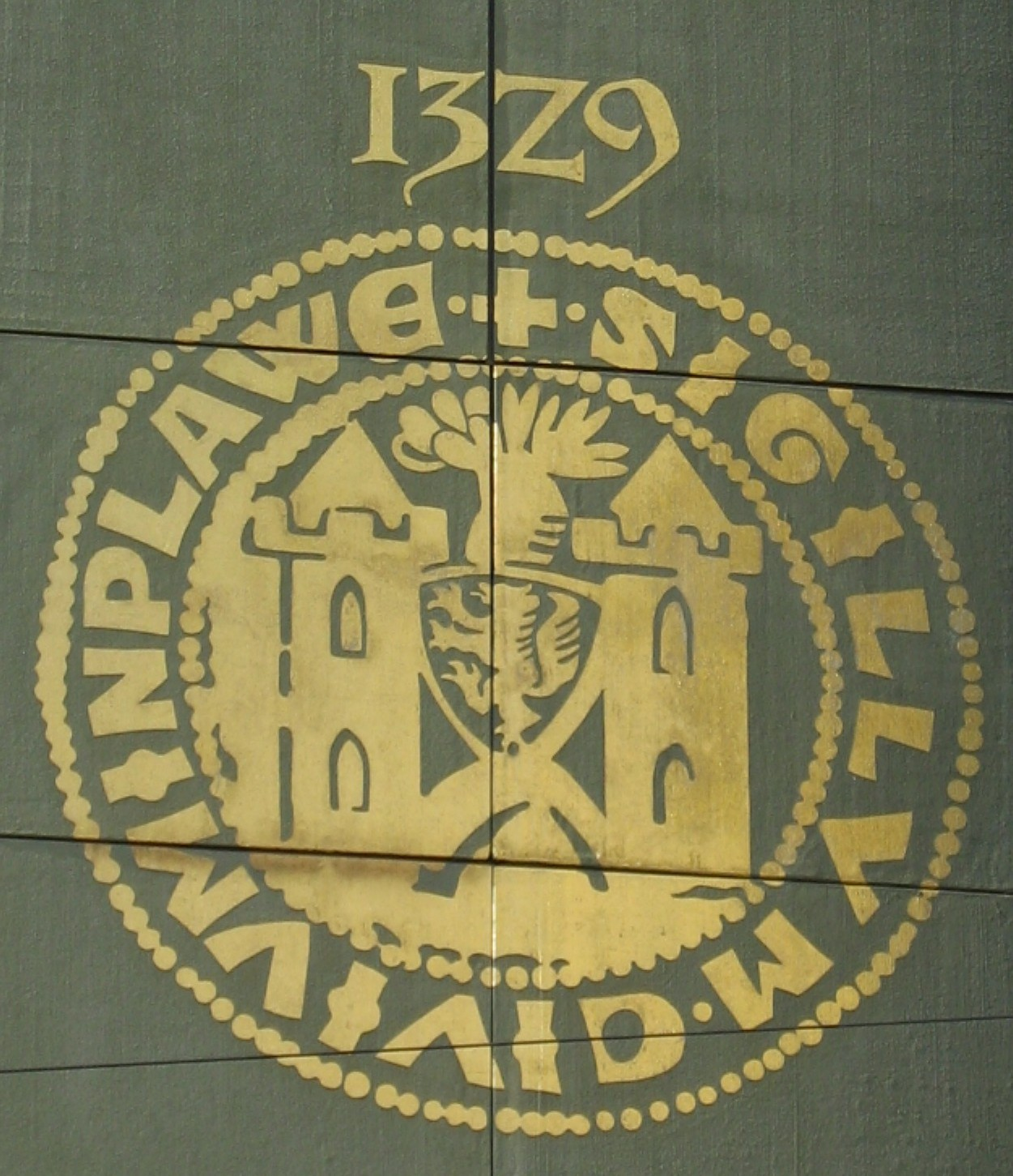 Stadtsiegel von 1329 an einer Häuserwand in der Bahnhofstraße